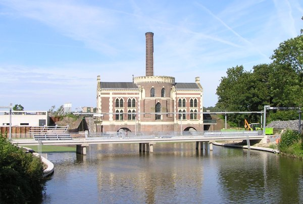 Gemaal Lijnden, gezien vanuit de Haarlemmermeer. Foto augustus 2005.